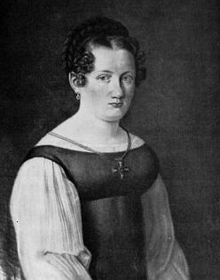 Charlotte von Siebold (1788–1859), deutsche promovierte Gynäkologin.